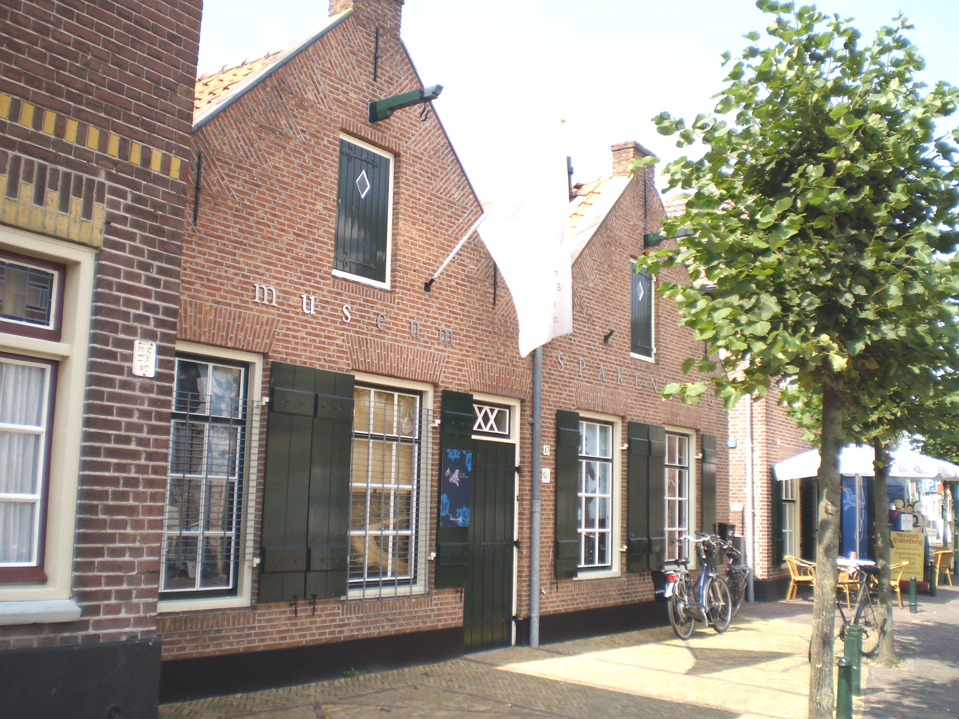 Ofbyld oanbean troch Swarte Kees op 20 augustus 2009